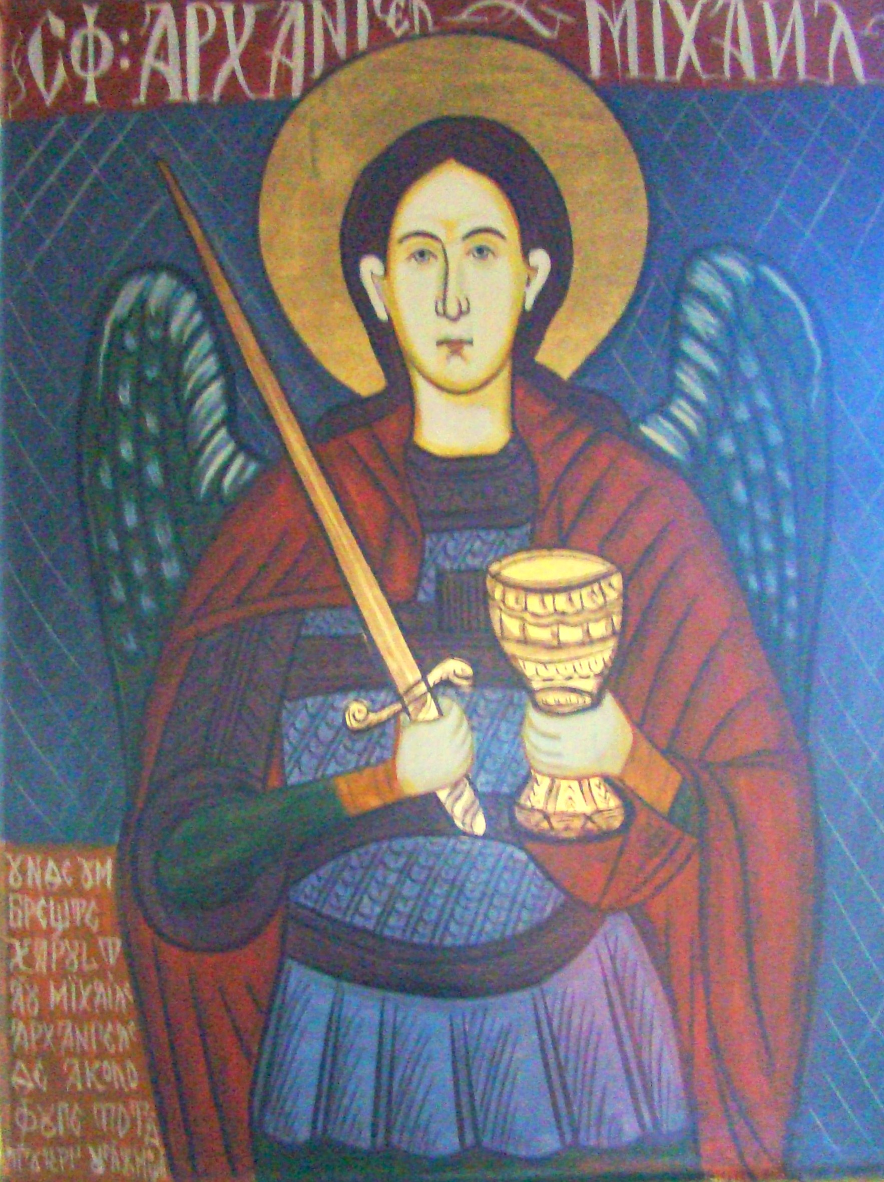 Biserica „Sfântul Nicolae” din satul Mănăstirea, județul Cluj